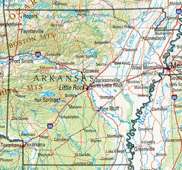 Karte von Arkansas. Aus der Perry Castaneda Lib. Public Domain (Original text: “Referenzkarte des US-Bundesstaates Arkansas”)